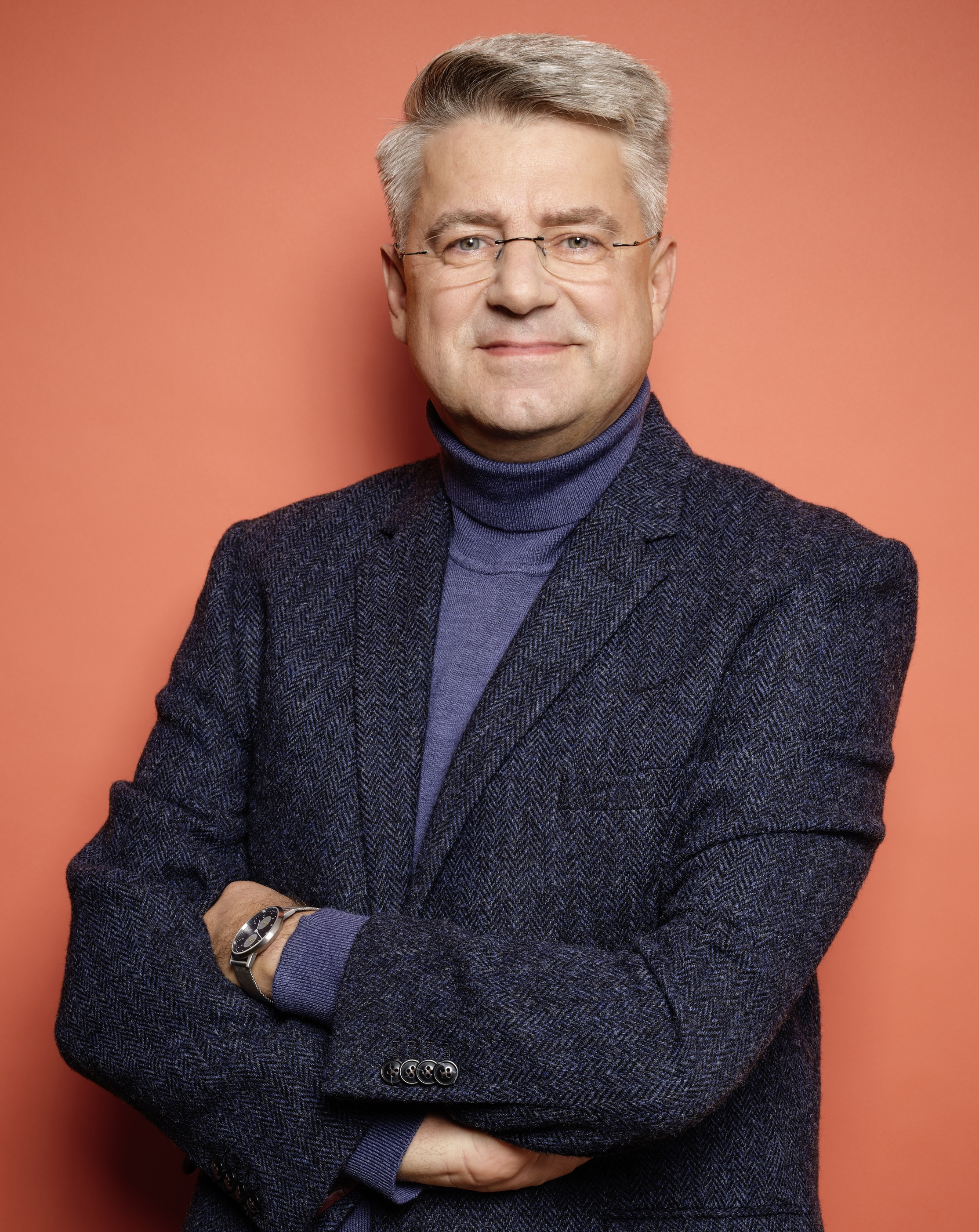 Dr. Sven Tode, Mitglied der Hamburgischen Bürgerschaft (2019)